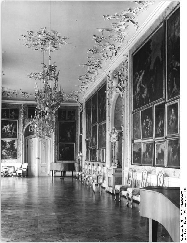 Dessau, Schloss Mosigkau, Großer Festsaal Zentralbild Hesse He-Hau 29.11.1966 Schloss Mosigkau bei Dessau Das Schloß ist vermutlich von G. W. Knobelsdorf 1752-1757 im Rokokostil errichtet. Es gehört zu den Dessauer Museen. Als Beihilfe des halleschen Instituts für Denkmalpflege wurden zur Ausseninstandsetzung und Herrichtung einzelner Räume 17,0 TMDN zur Verfügung gestellt. UBz: Blick in den grossen Festsaal.